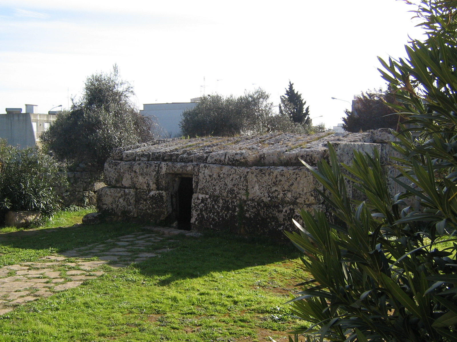 Centopietre di Patù, Lecce